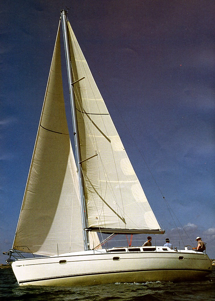 Segelyacht